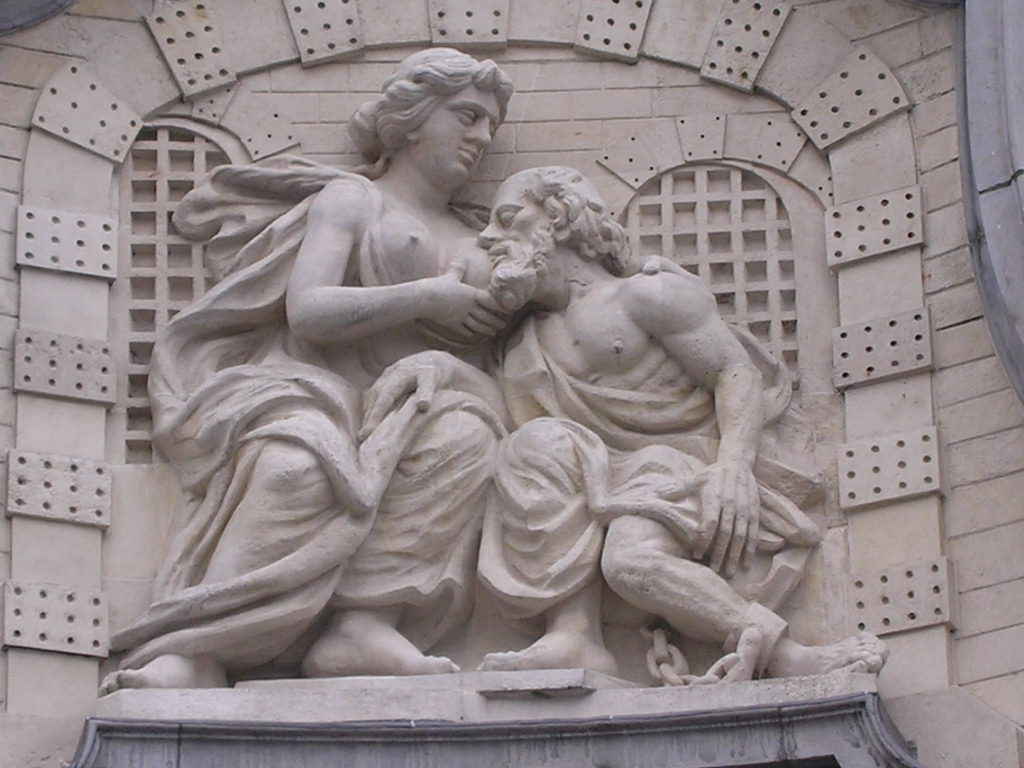 Statue in Ghent, Belgium